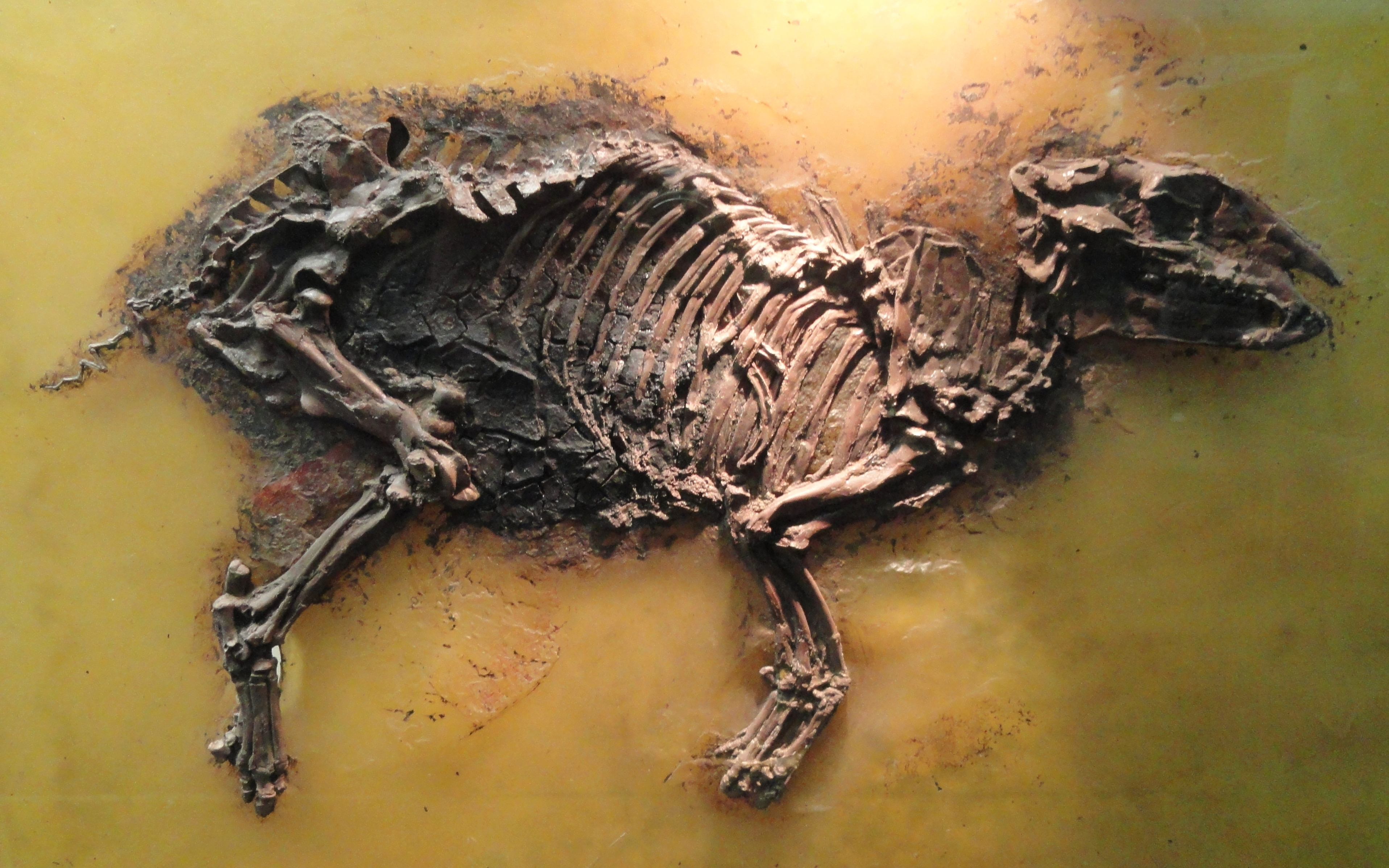 Exhibit in Naturmuseum Senckenberg, Frankfurt am Main, Germany.